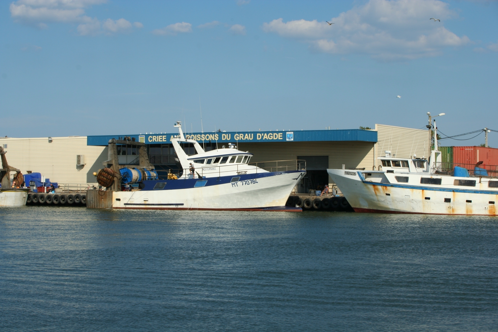 Criée au poissons du Grau d'Agde (Hérault), côté quai